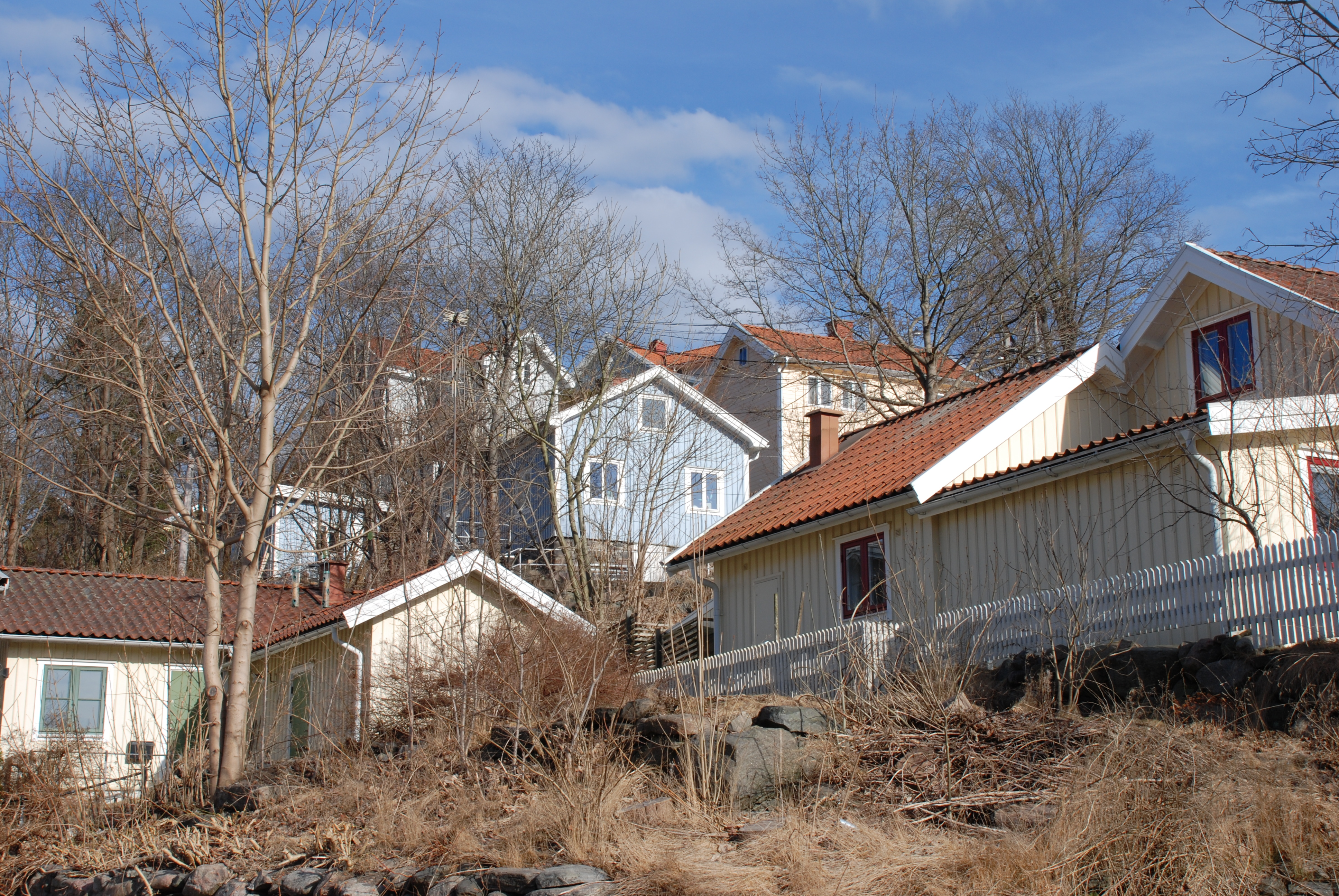 Roten M i Mölndals Kvarnby sedd från Norra Forsåkersgatan.